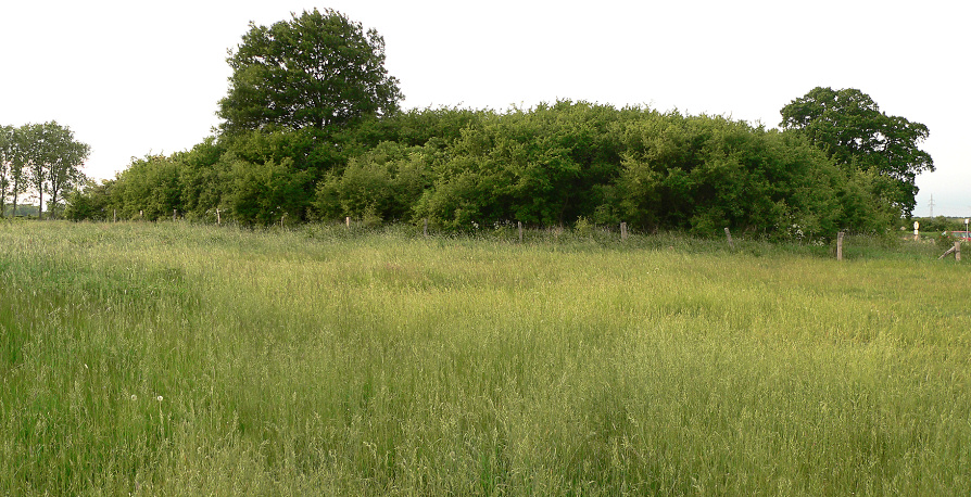 Burg Blankenhagen Nebenhügel Secondary mound, Blankenhagen Castle site, Lower Saxony, Germany.